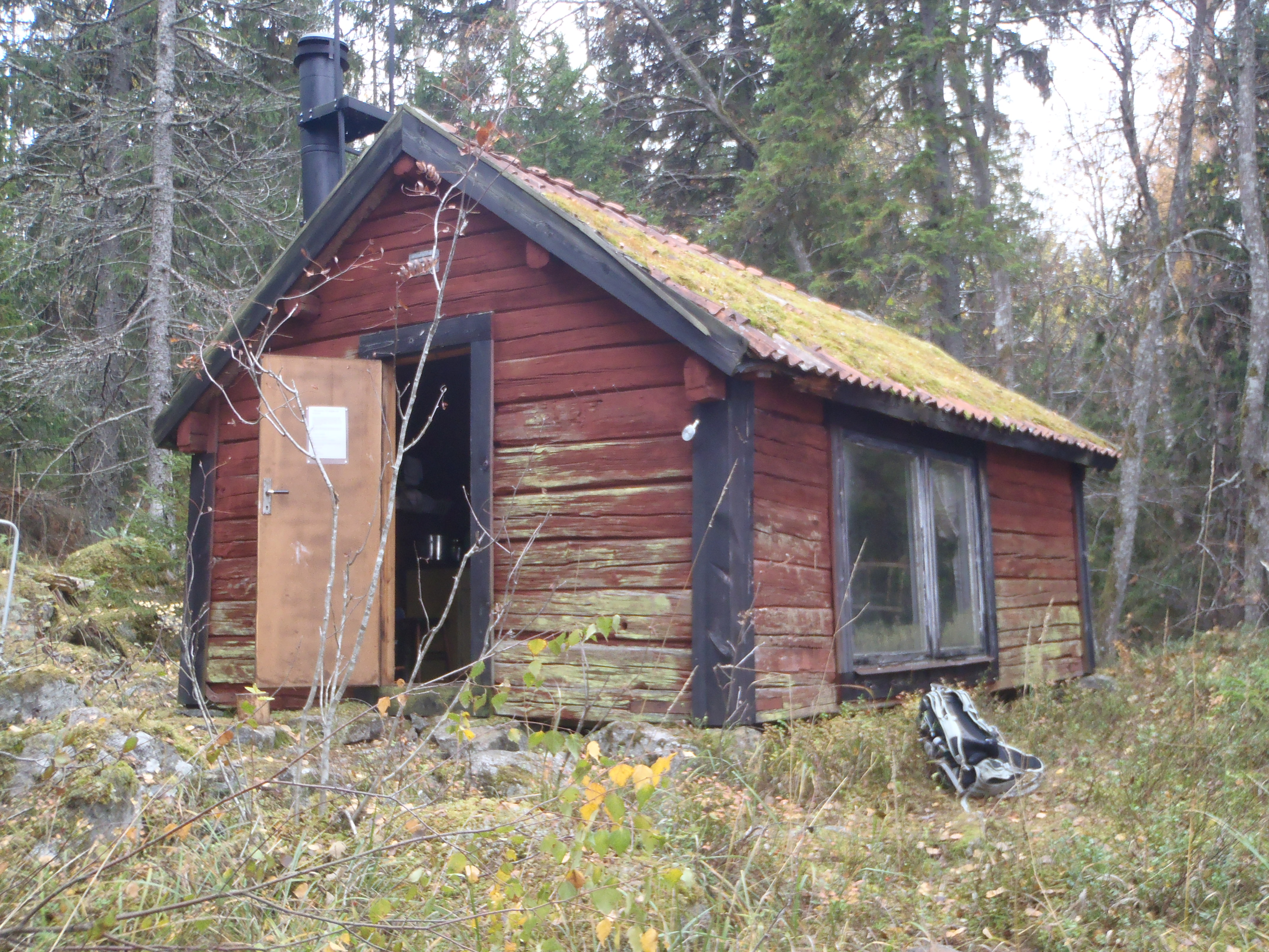 Man kan övernatta i stugan i Tjäderleksmossen